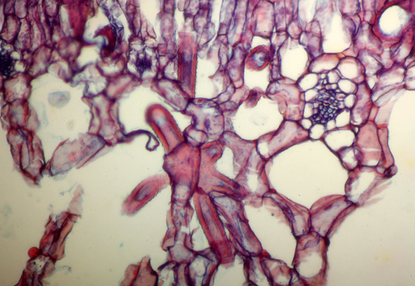 Astrosklereide in Blattquerschnitt von Nymphea (Seerosen) Durchlichtmikroskop, 400 fach, Astrablau /Safarin-Färbung